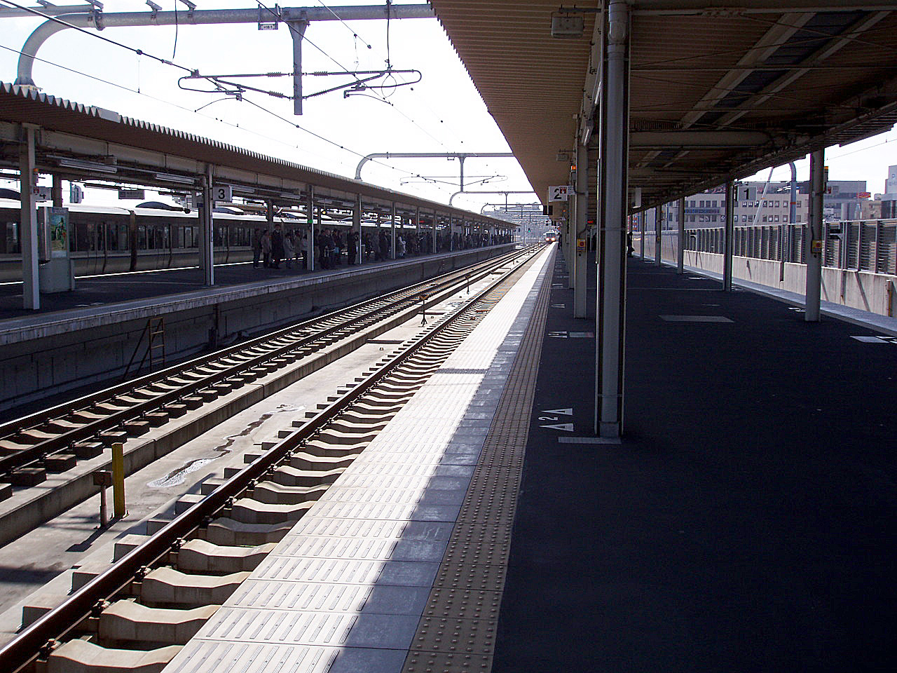 West Japan Railway Sanyo Main Line（JR Kōbe Line） & Kakogawa Line Kakogawa Station Platform 西日本旅客鉄道 山陽本線（JR神戸線）&加古川線 加古川駅 駅ホーム